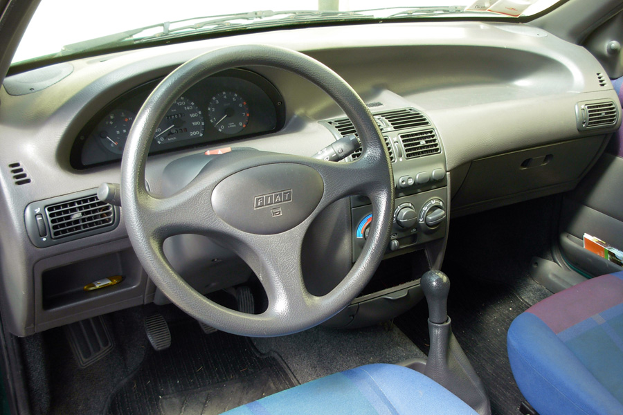 Interno di una Fiat Punto 55 SX del 1997